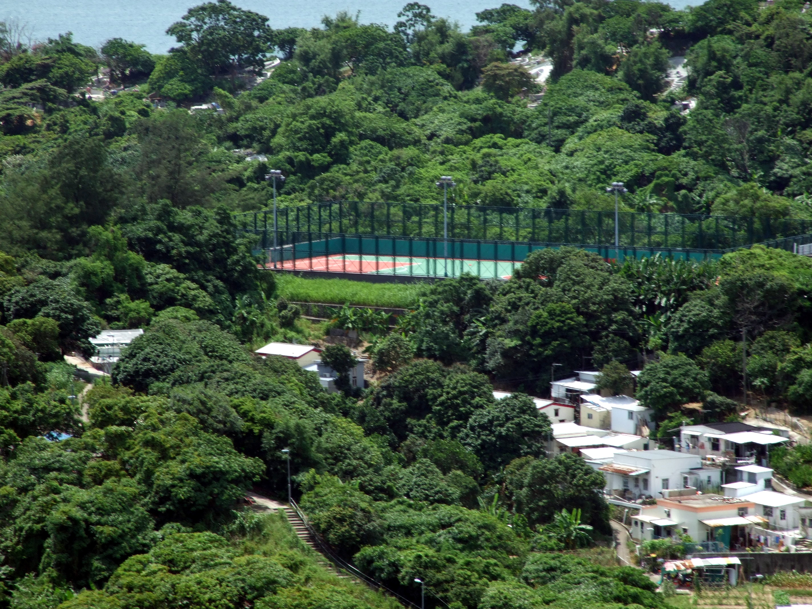 中文（香港）: 坪洲小型足球場